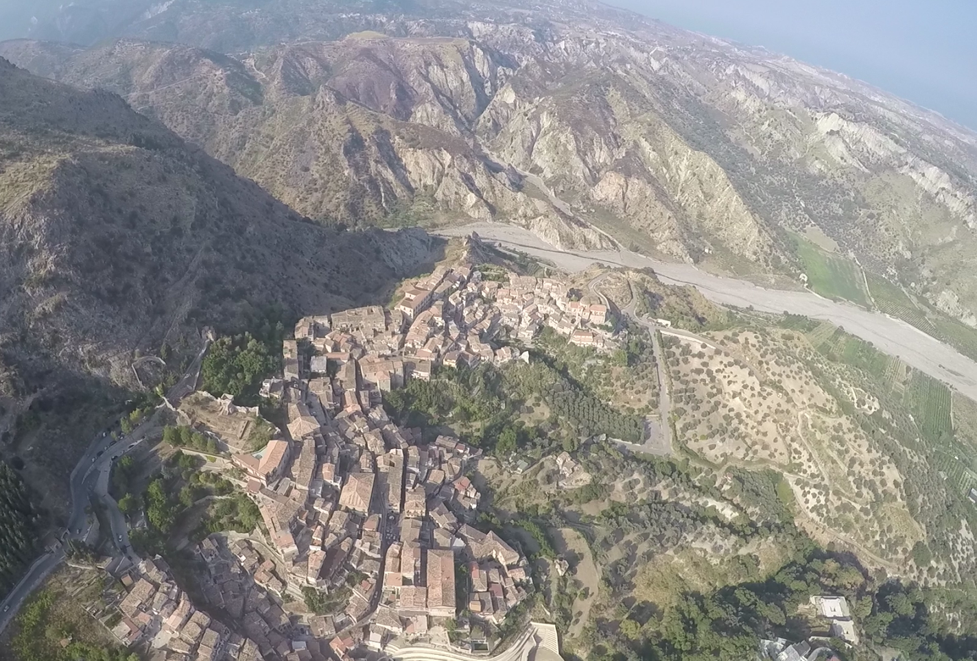 Stilo vecchio 2 dall'alto 2016